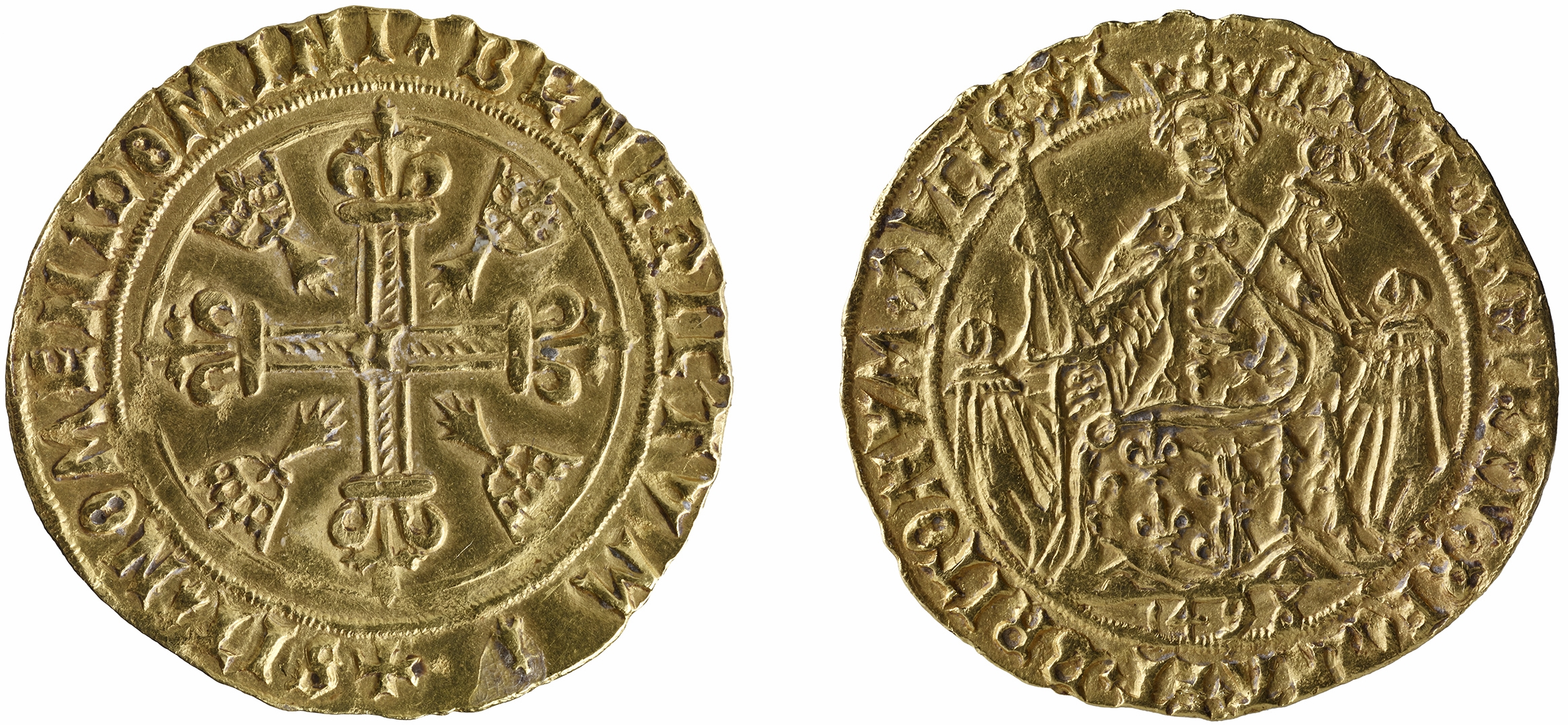 Cadière d'Anne de Bretagne - Numéro d'inventaire : 997.0069.1 Avers : Sur l'avers, la duchesse Anne est représentée assise sur un trône, en majesté, reprenant un motif utilisé par de nombreux rois de France. Elle tient un sceptre dans la main droite, une épée dans la main gauche et a la tête est ceinte d'une couronne. Sa robe et son manteau reprennent les armes de Bretagne et de France : hermines et fleurs de lys. La date est placée sous les pieds du sujet. La grènetis est entourée par la mention ANNA.D.G.FRAN.REGINA.ET.BRITONVM.DVCISSA (« Anne, par la grâce de Dieu, reine des Français et duchesse de Bretagne »). Revers : Une croix d'inspiration Renaissance est présente au revers, chargé en cœur d'un N oncial. Elle est ornée à chaque extrémité de deux bourrelets inégaux, surmontés d'une croix fichée entre deux pétales de lis. La mention SIT ! NOMEN ! DOMINI ! BENEDICTUM ! est présente dans le cercle délié entourant la croix.